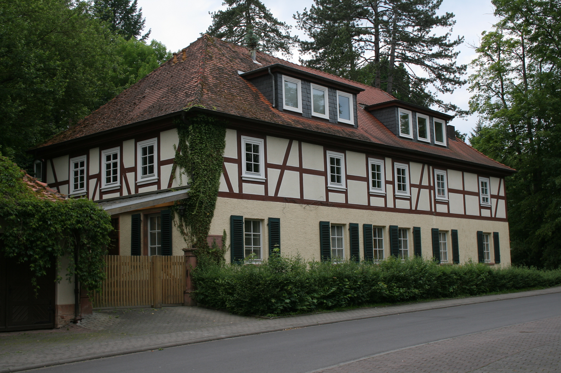 Ehemalige Hallenmühle Schloss Hallenburg in Schlitz. Das Gebäude beherbergte die Limnologische Fluss-Station Schlitz des Max-Planck-Instituts für Limnologie.